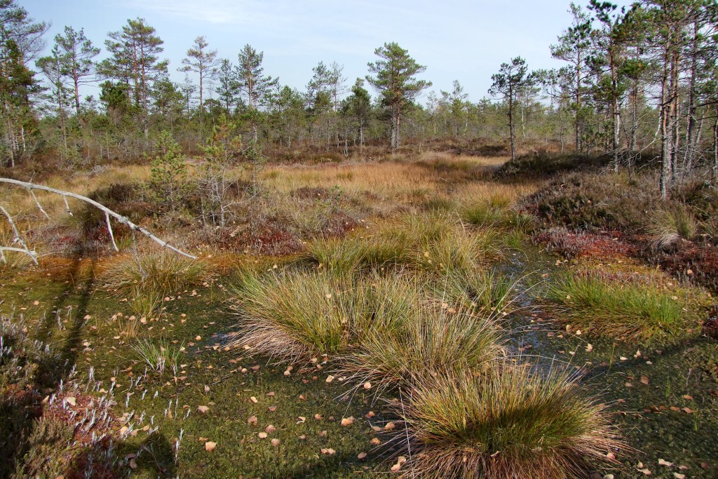 Teiču purvs